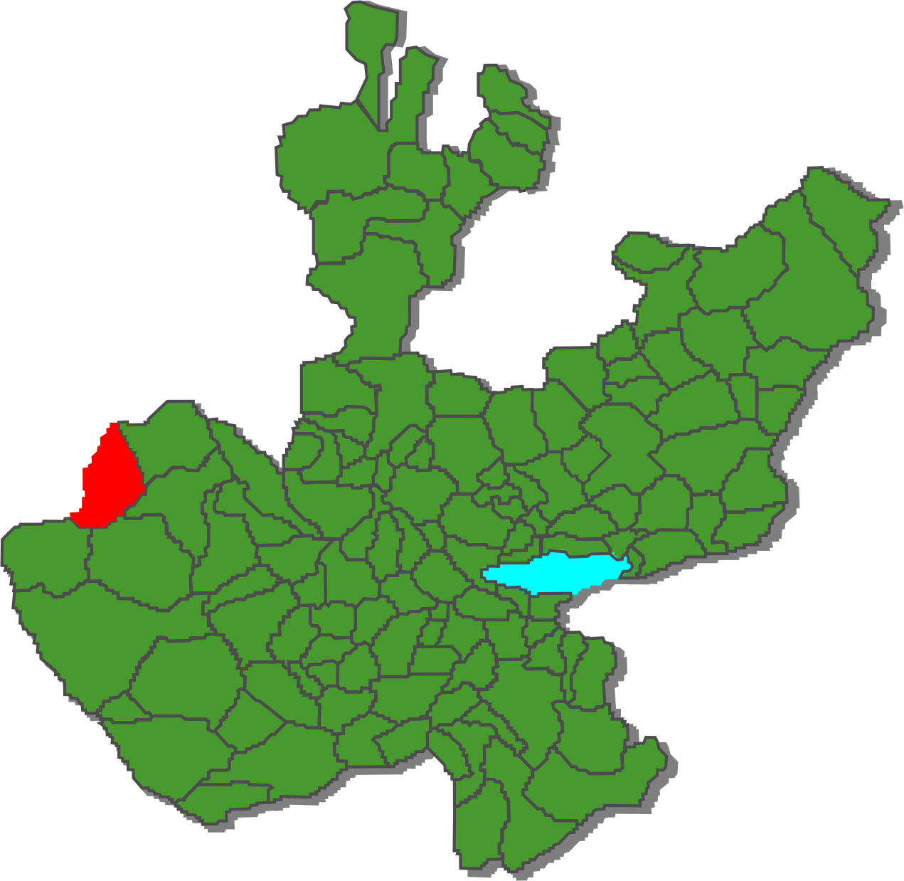 Mapa de ubicación del Municipio de Puerto Vallarta en Jalisco, México.